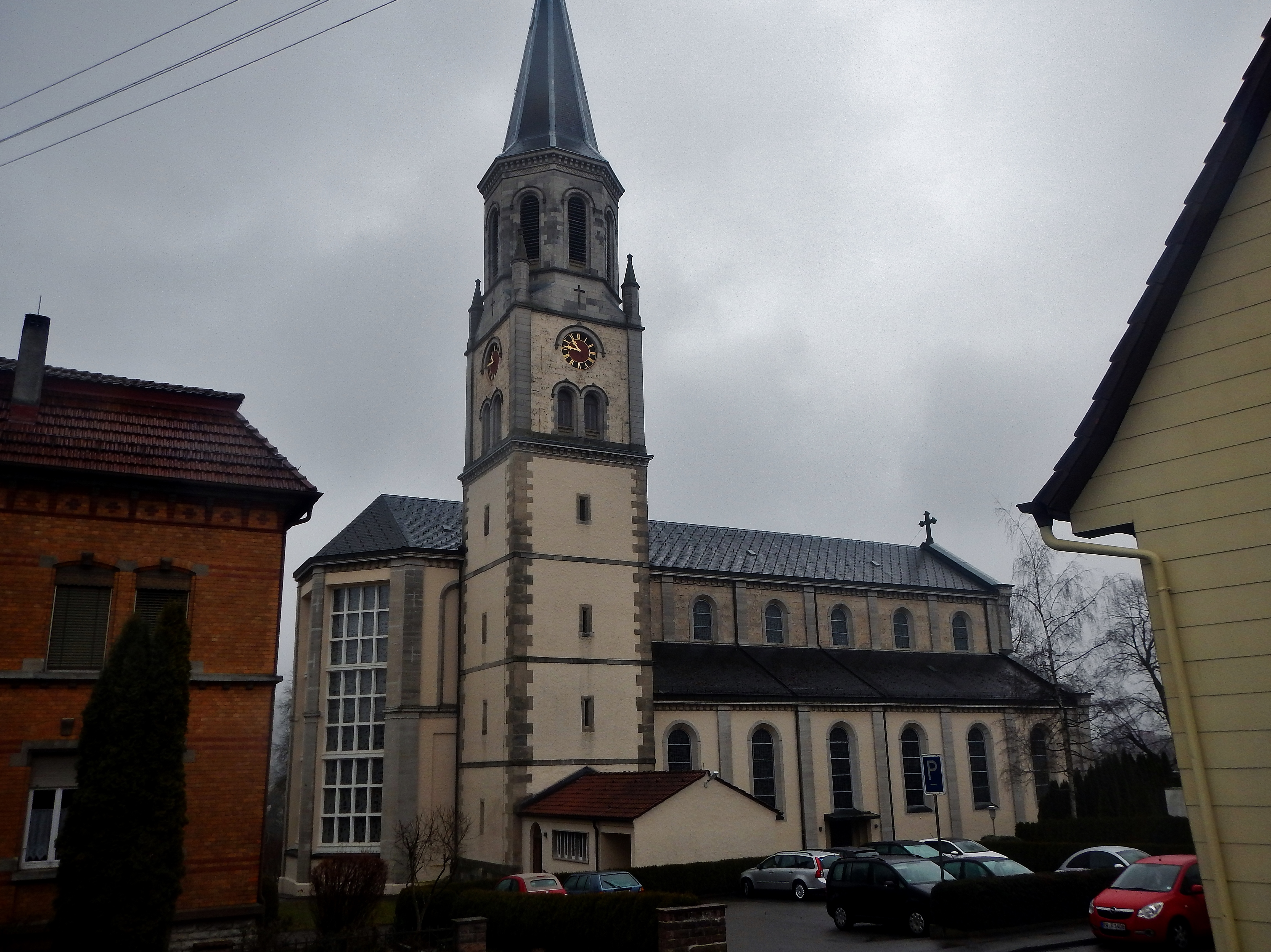 St. Laurentius-Kirche